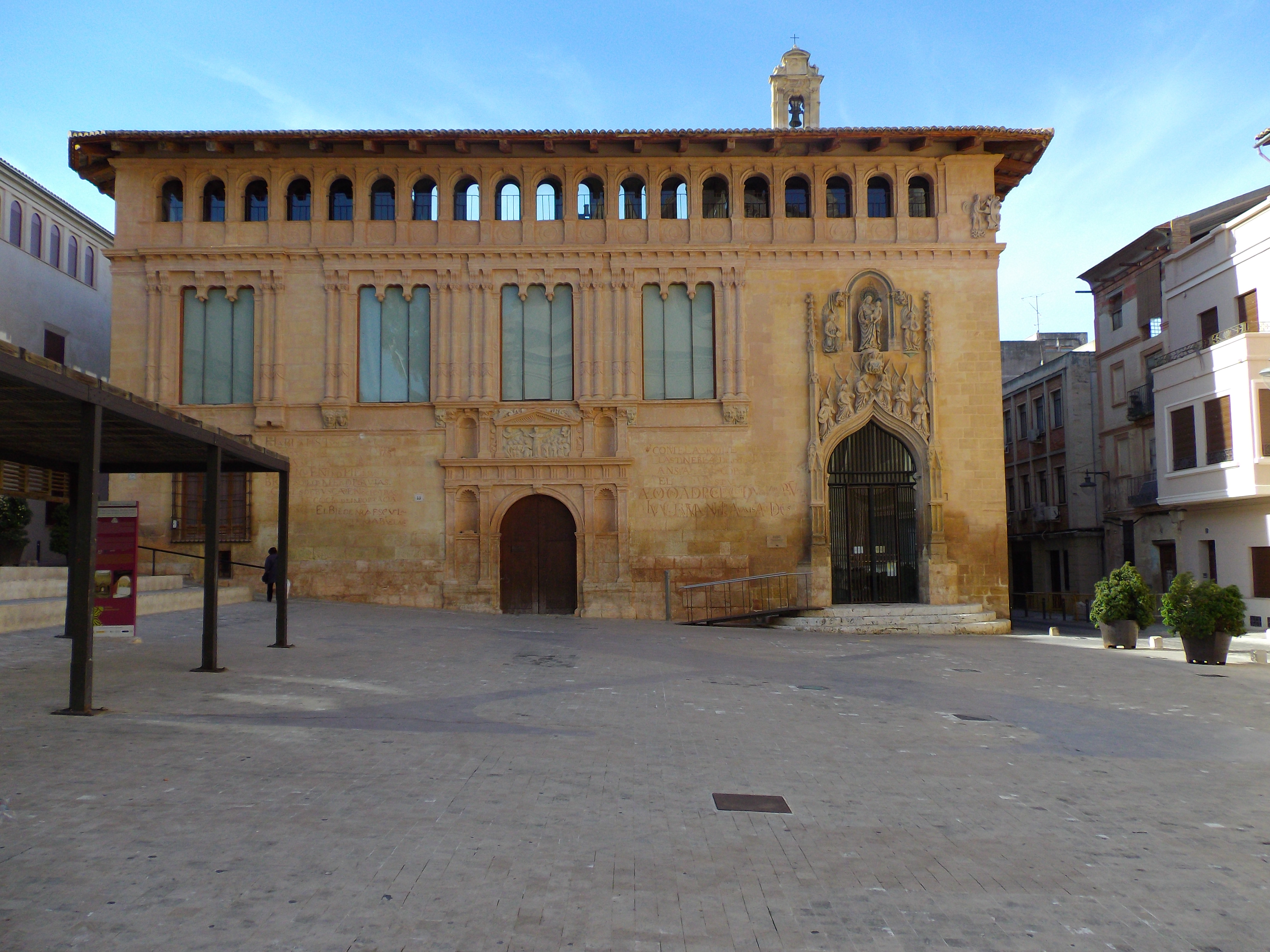 Plaça de la Seu, o Calixt III, Xàtiva.